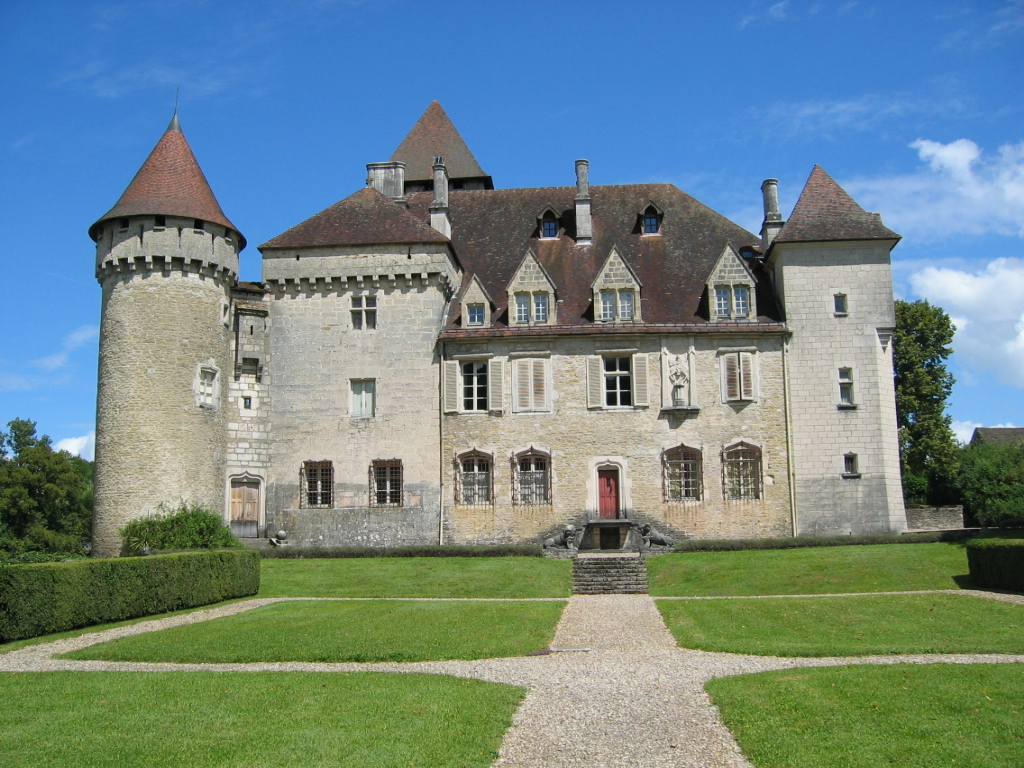 Chateau de Cleron dans le Doubs - France